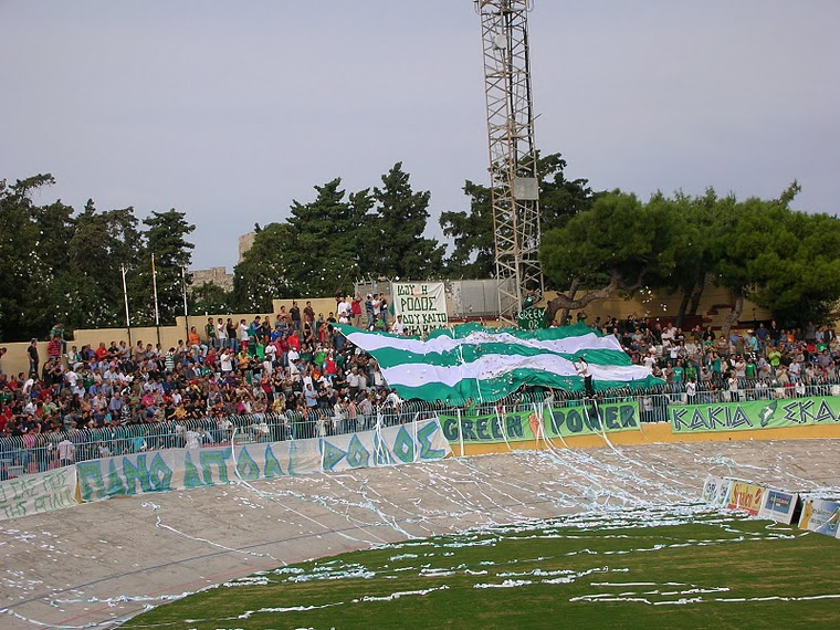 Κακιά Σκάλα